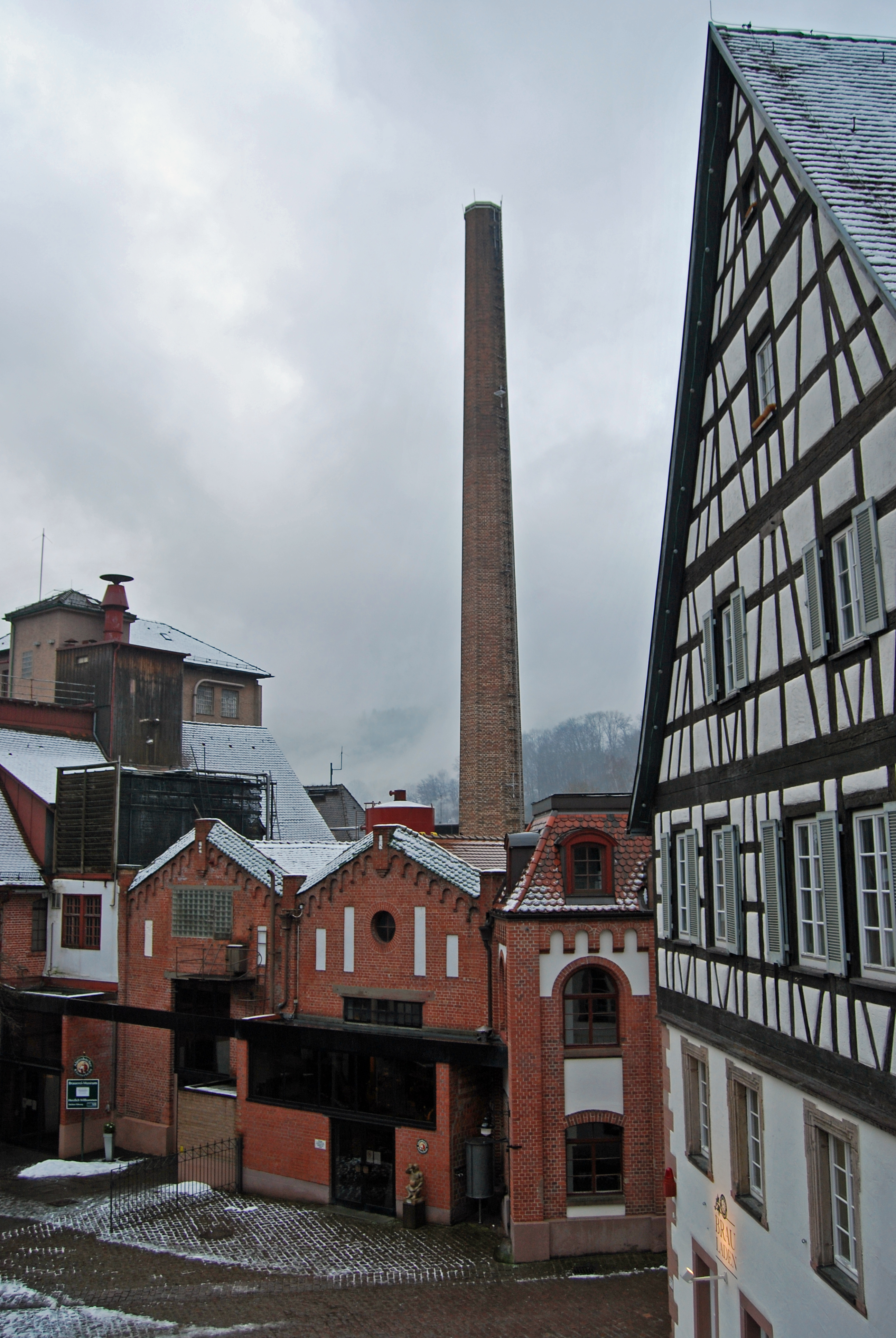 Brauereimuseum